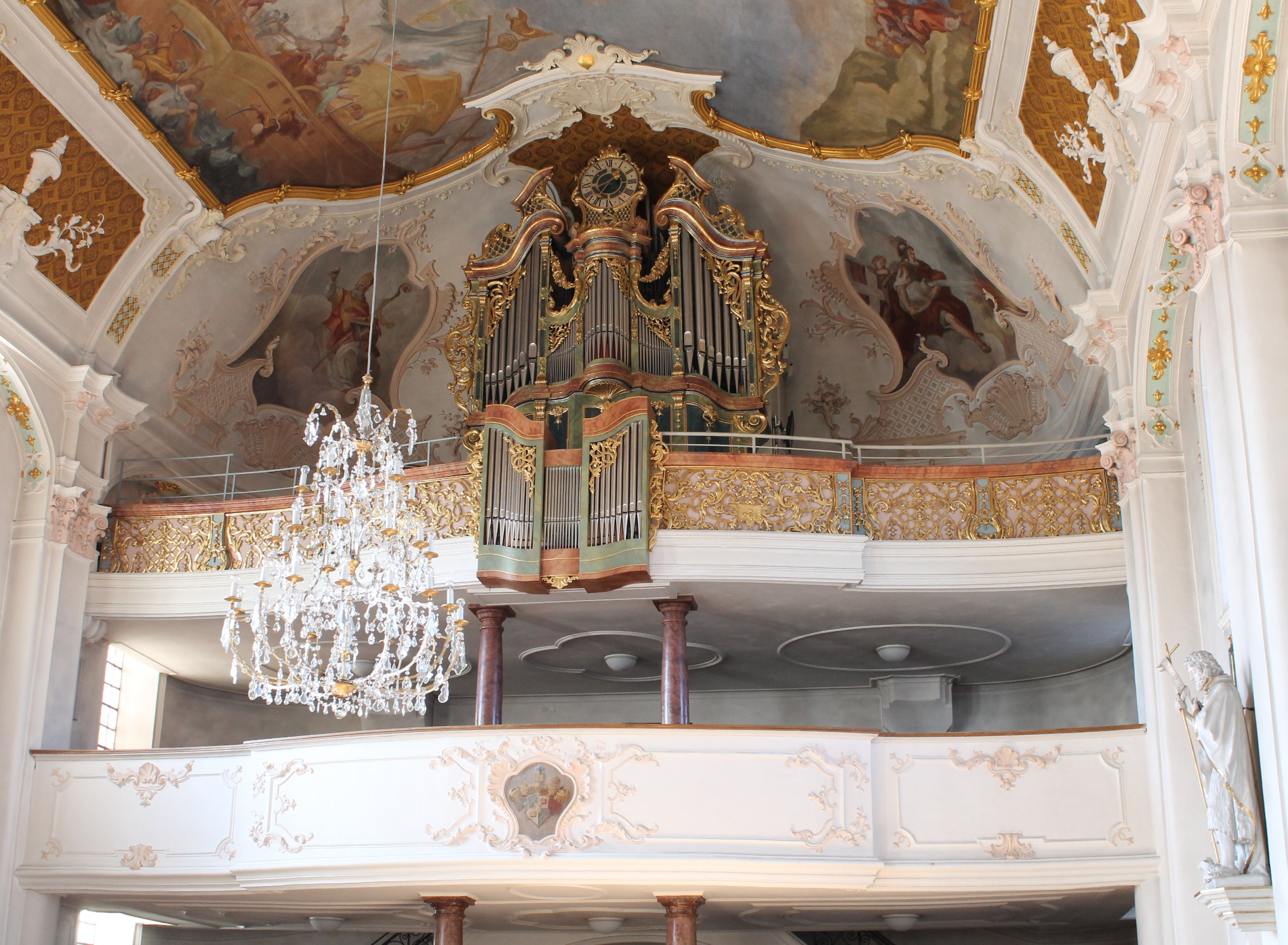 Orgel von St. Mariä Himmelfahrt in Prien am Chiemsee (1994, Gerald Woehl, III/50)